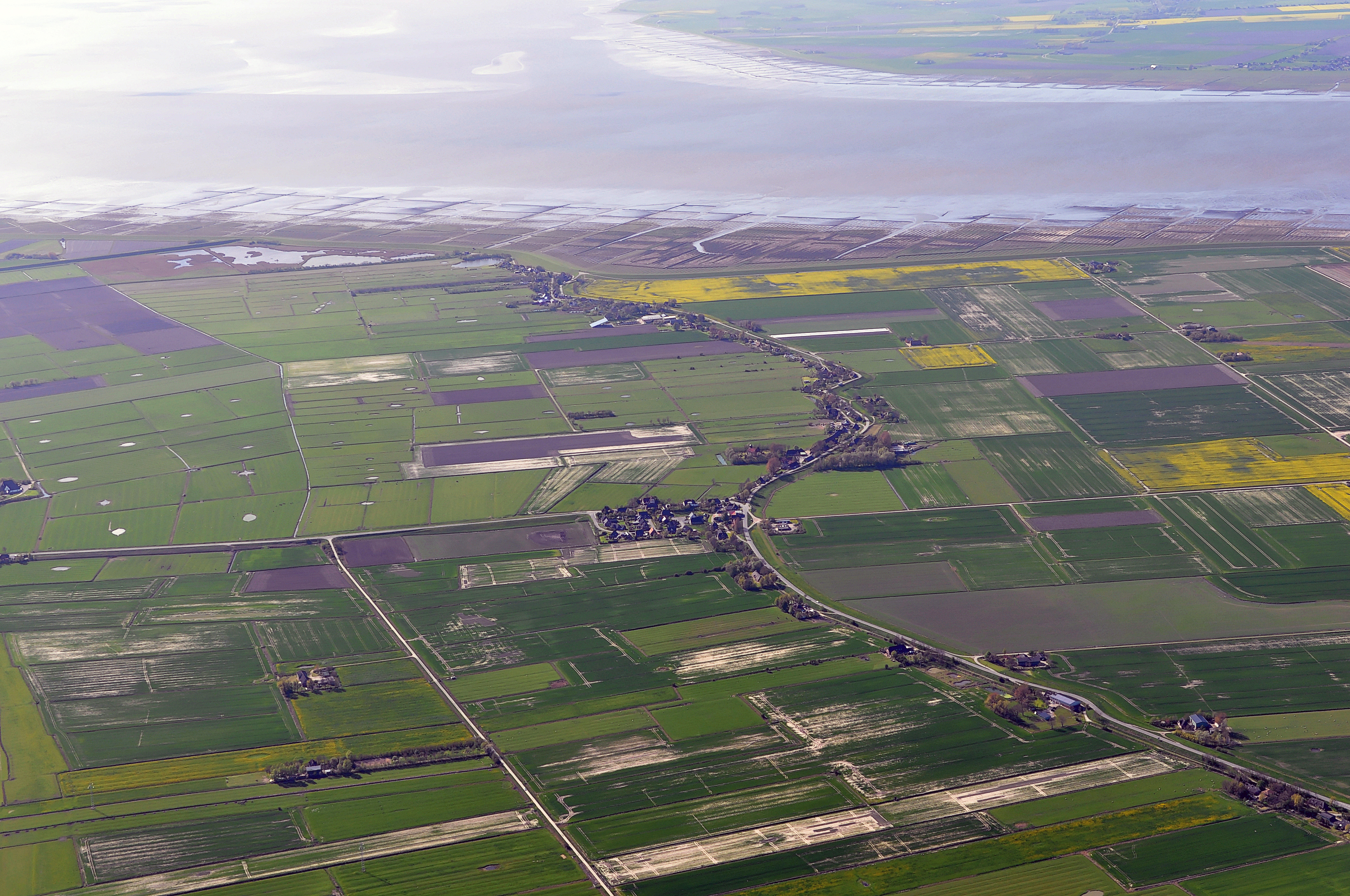 Luftbilder von der Nordseeküste 2012-05